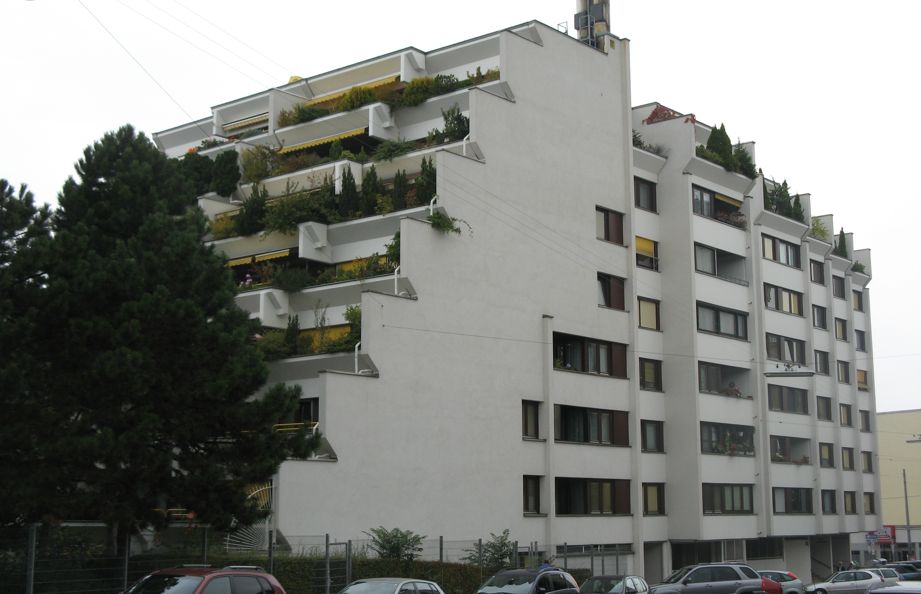 Wohnhausanlage (1971-73) von Harry Glück und Werner Höfer, Gußriegelstraße 28-30, Wien-Favoriten